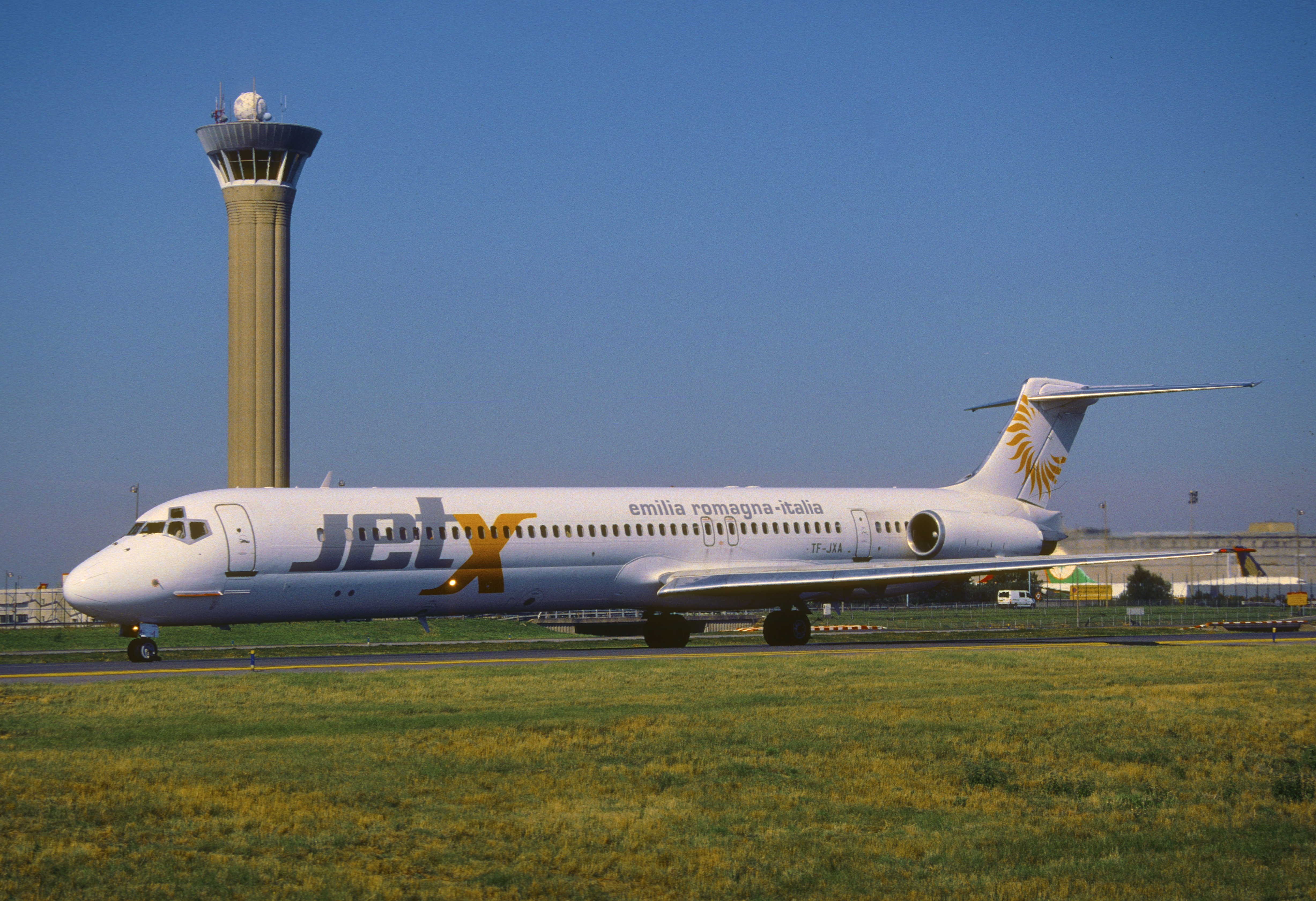 316dx - Jet X MD-82; TF-JXA@CDG;06.09.2004